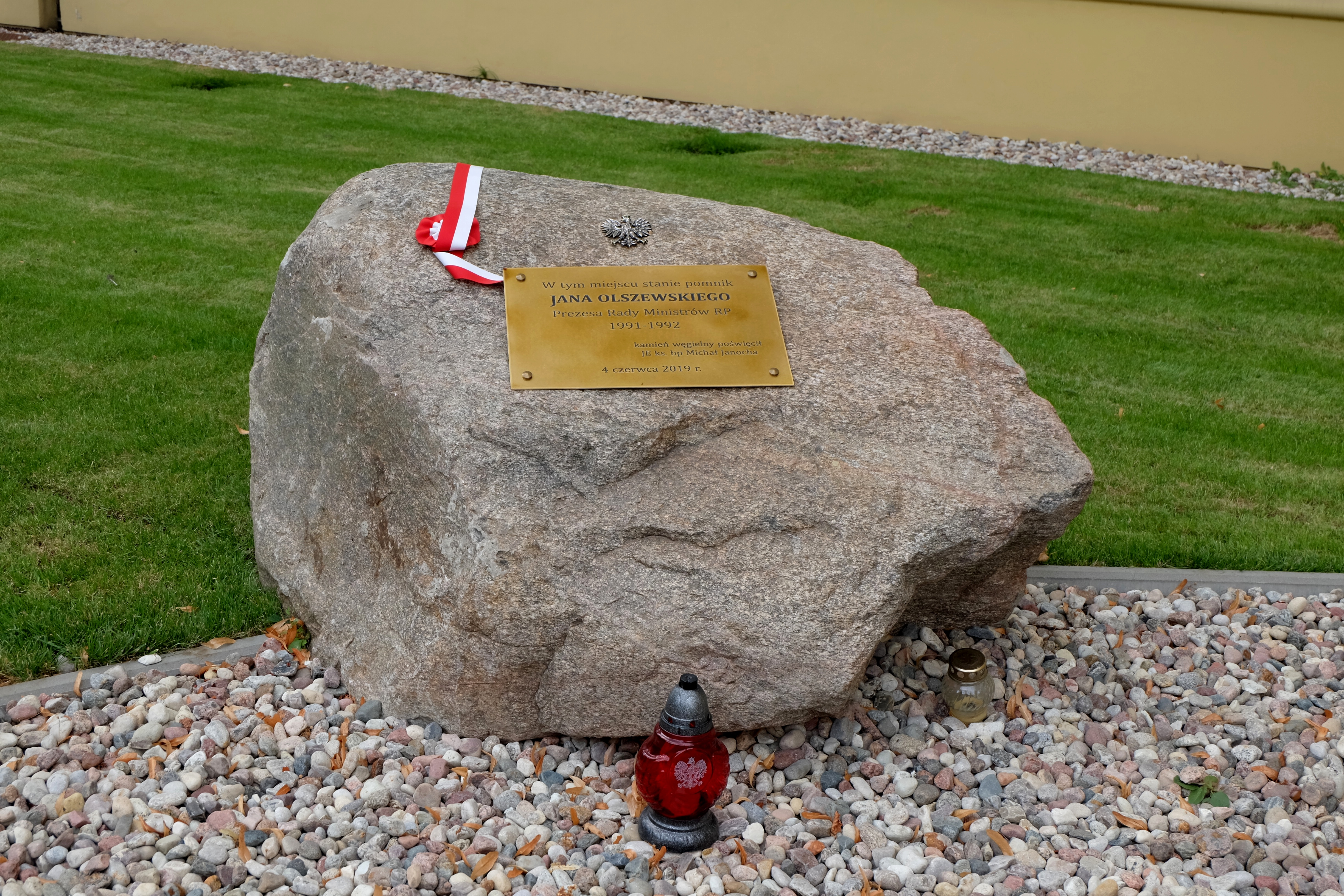 Kamień węgielny pod Pomnik Jana Olszewskiego przed gmachem Kancelarii Prezesa Rady Ministrów w Alejach Ujazdowskich w Warszawie